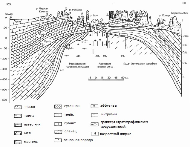 Геологический разрез по линии Айдар – Борисоглебск.